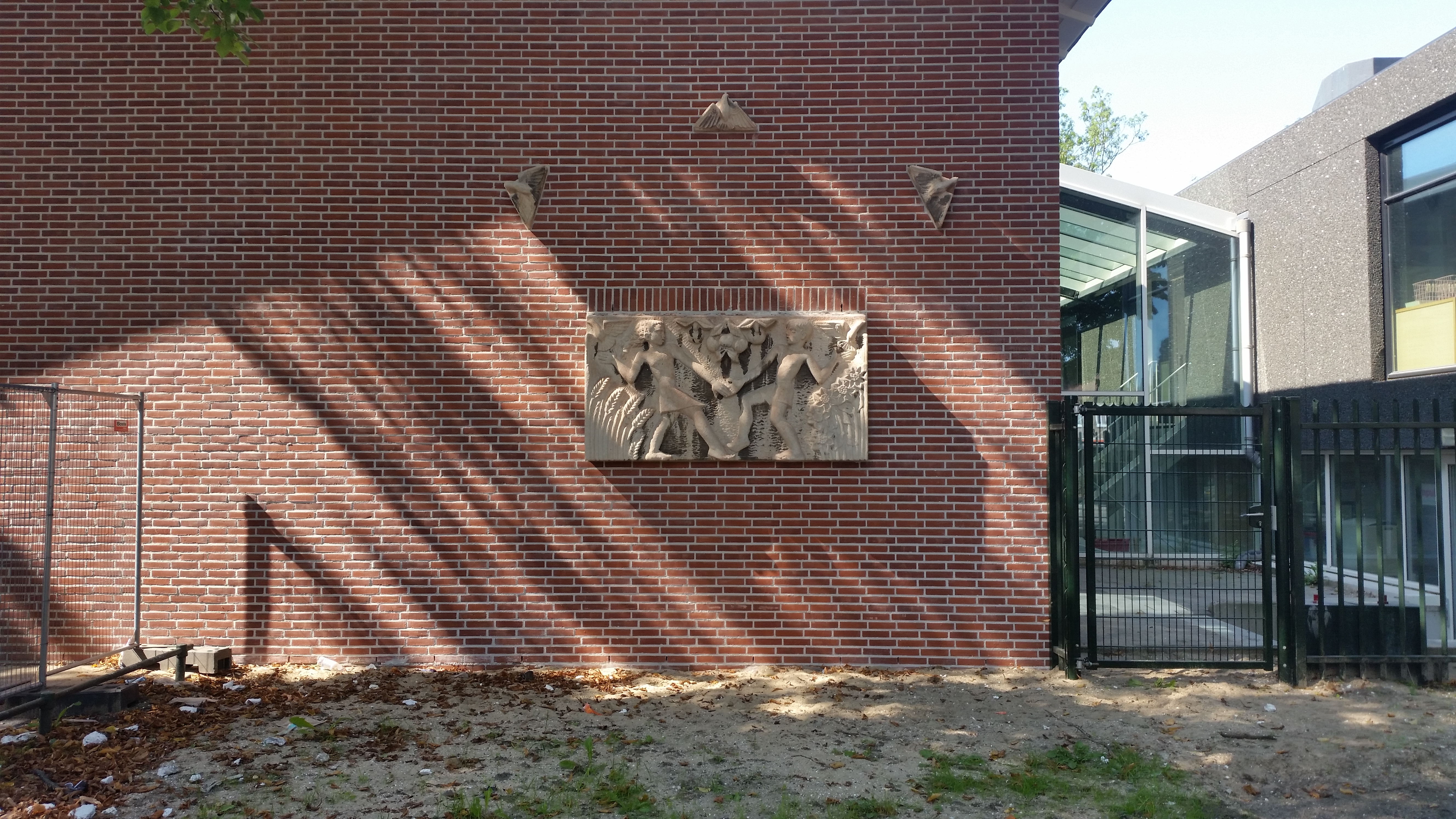 Frits Sieger: Jongen, meisje en vogels, Burgemeester Fockstraat, Amsterdam -Slotermeer